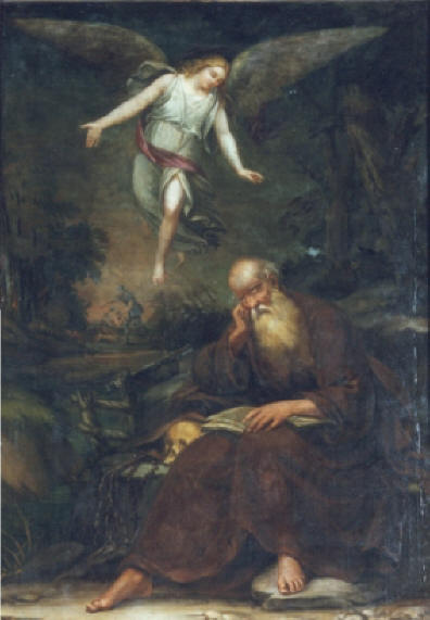 Quadro autore ignoto del primo 1600, conservato nella Chiesa di Calendasco di Piacenza, che mostra San Corrado Confalonieri eremita francescano piacentino